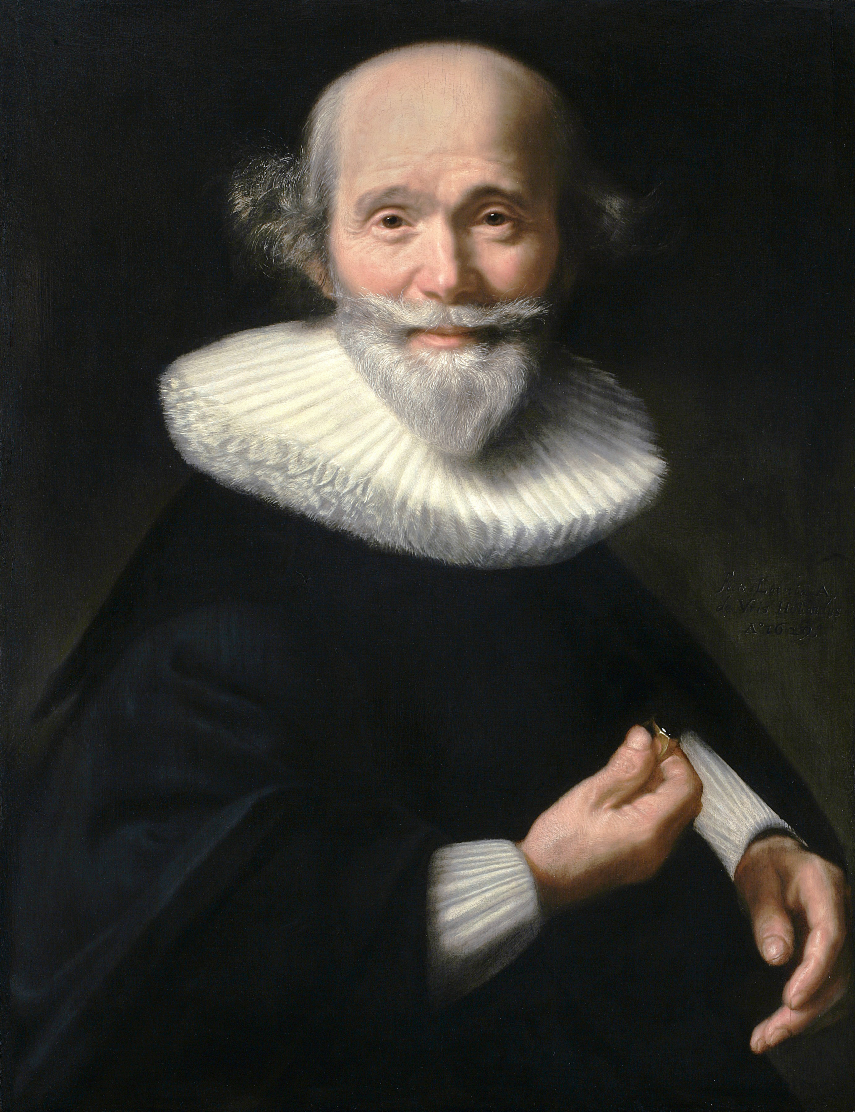 Abraham de Vries, Portrait d'homme, 1629, huile sur panneau, 65,3 x 50,4 cm, Paris, Petit Palais, musée des Beaux-Arts de la Ville de Paris.